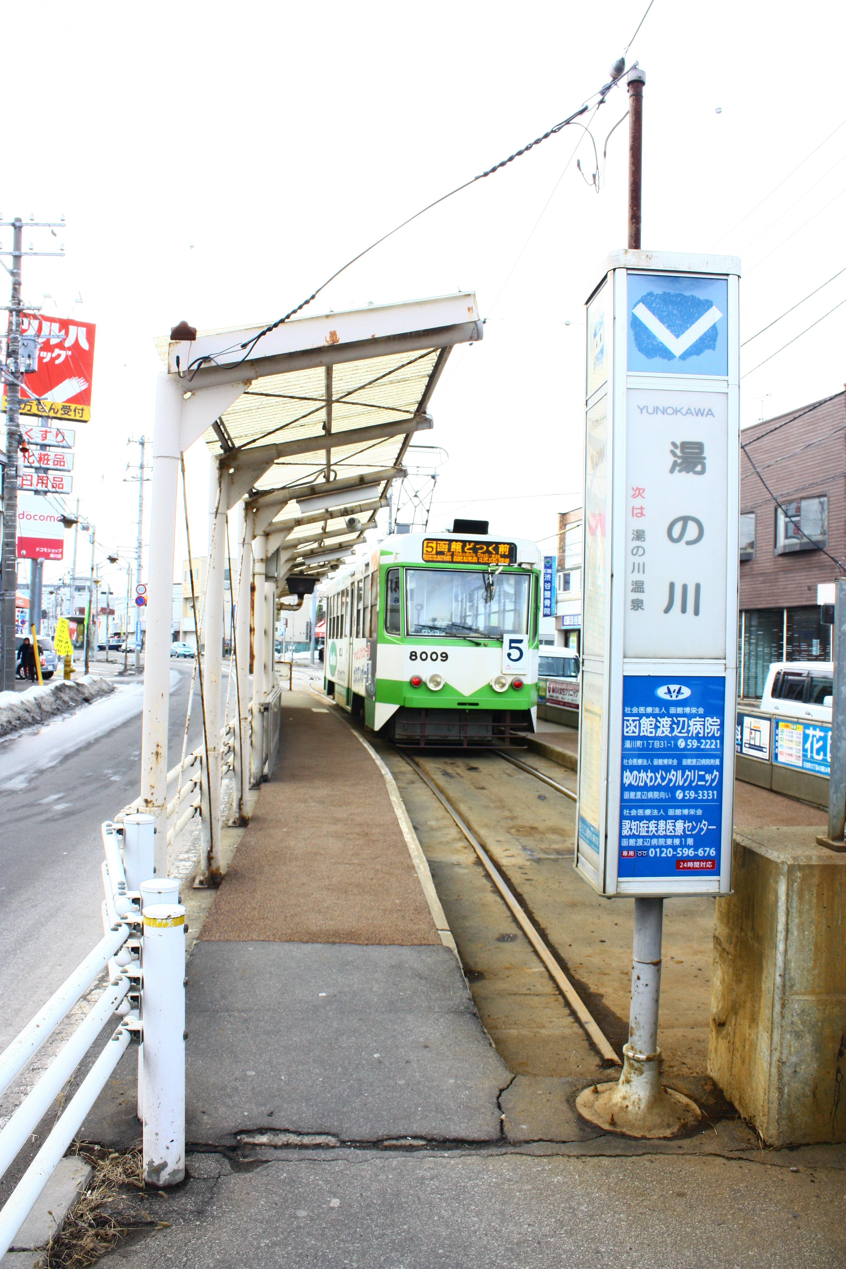 函館市企業局交通部湯の川停留場